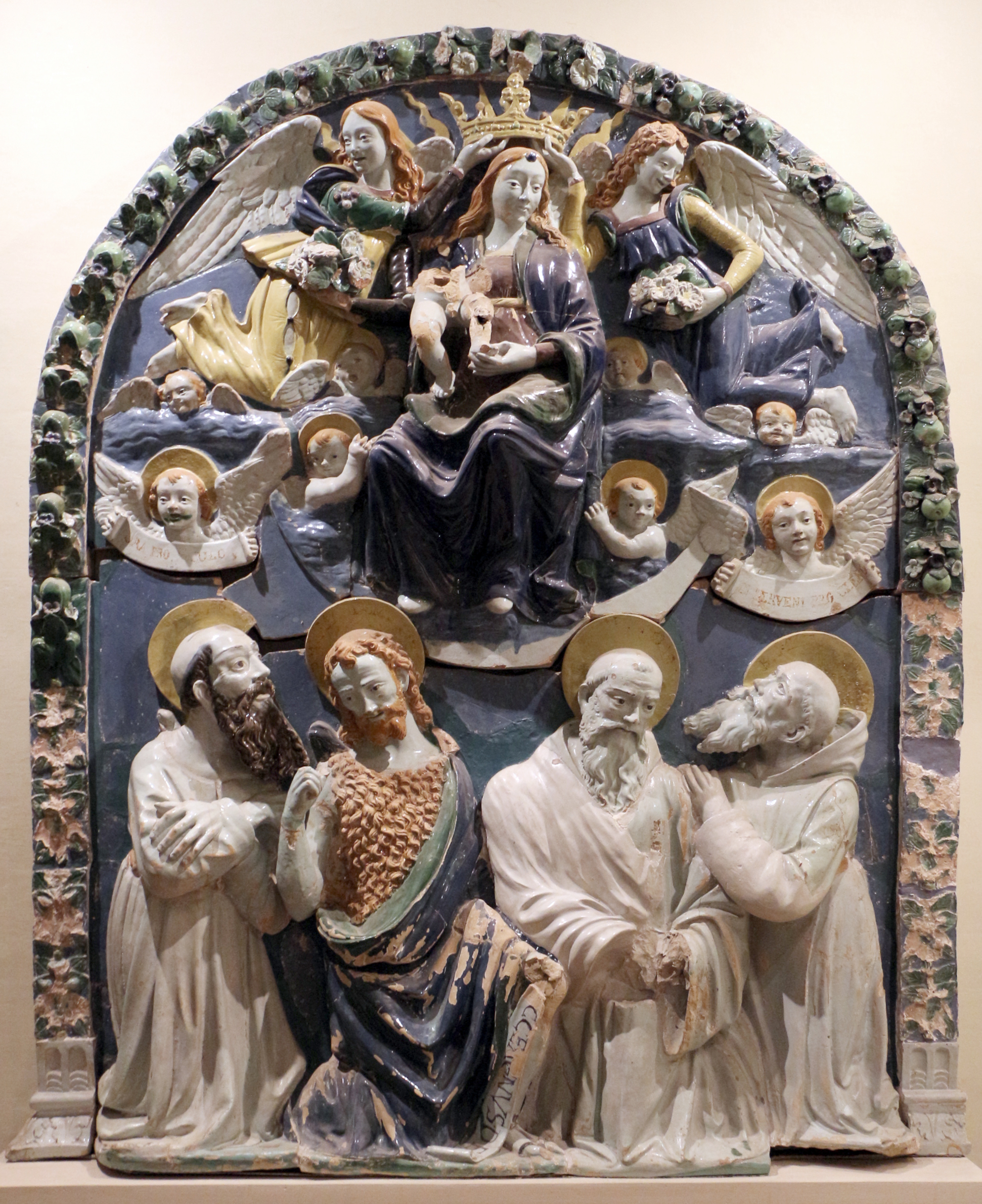 Pinacoteca Civica, Palazzo Pianetti This is a photo of a monument which is part of cultural heritage of Italy.